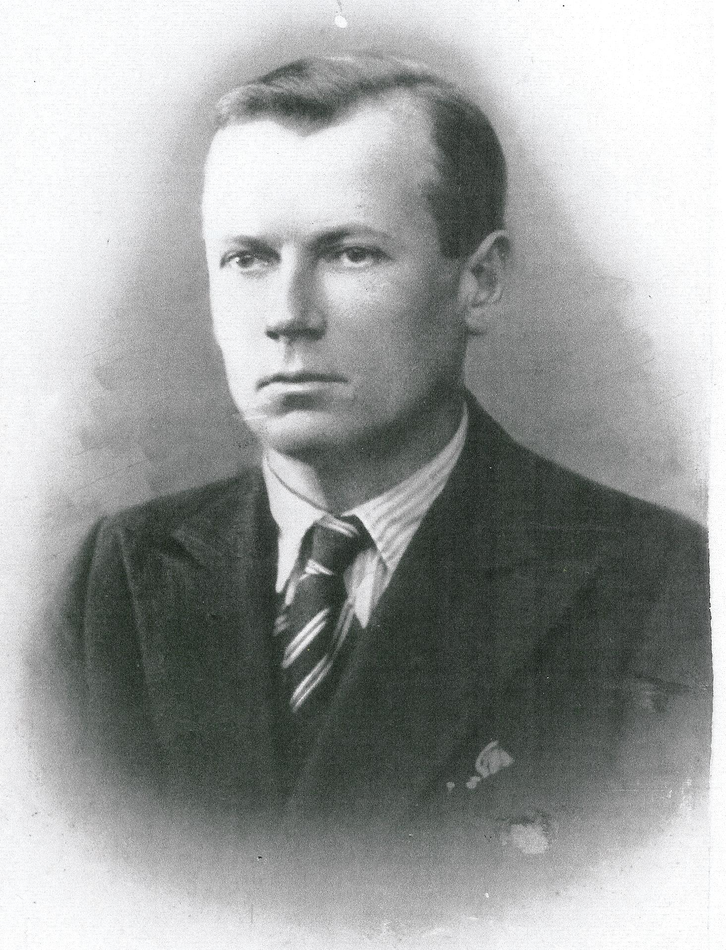 Photo du Lieutenant Marcel CLECH